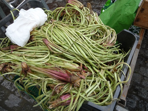 rachis de scolyme (Scolymus hispanicus) vendus sur le marché de Jerez de la Frontera. Le chiffon blanc a dû servir à ôter les ailes épineuses des rachis des feuilles. Cuisiné avec des escargots.